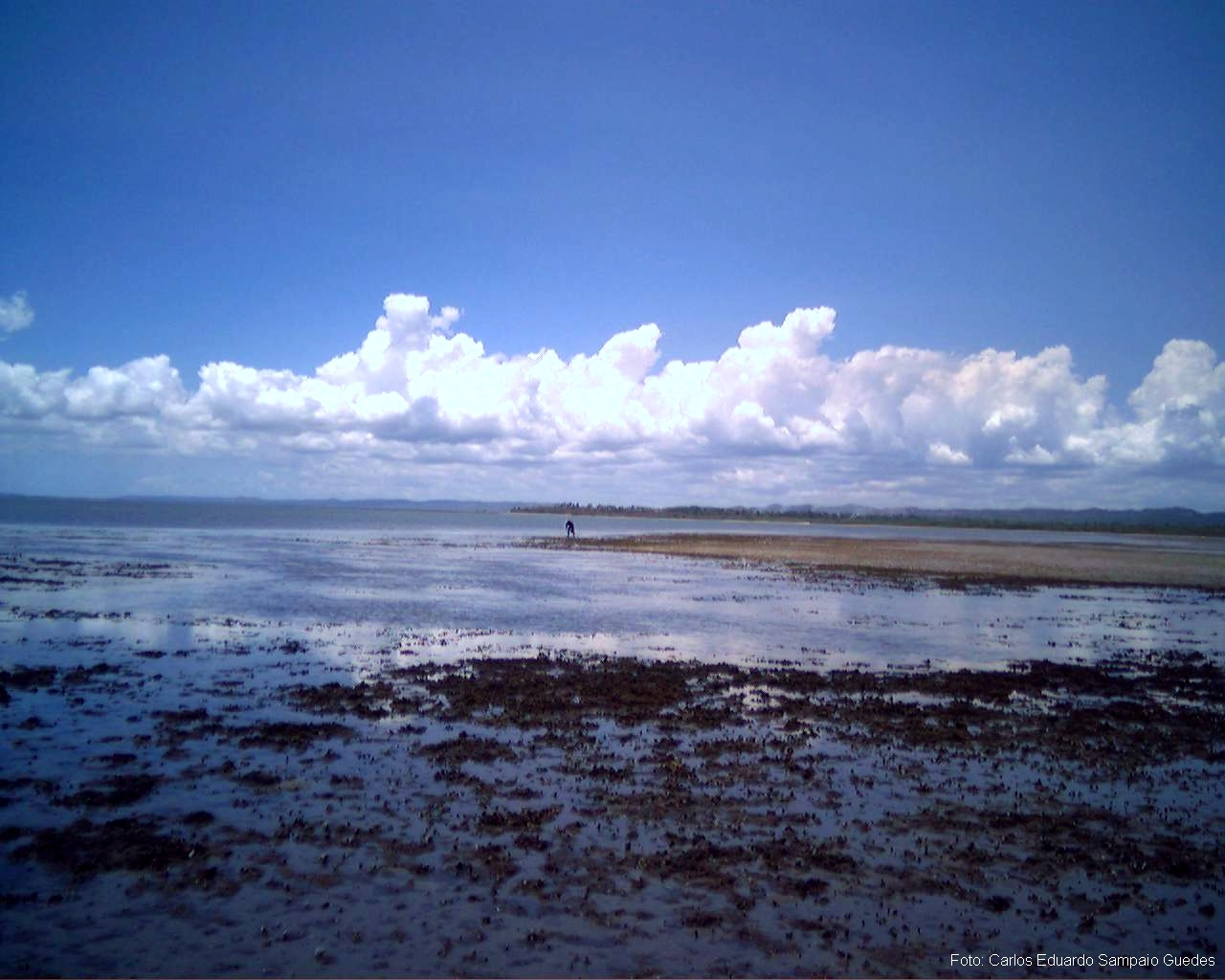 Description = Outra foto da praia do Sol com vista para a ponta de Saubara na Bahia no Brazil - Enviadas por e-mail para que eu as coloca-se na wiki. Source = Date = 2006 Author = Carlos Eduardo Sampaio Guedes Permission = other_versions =